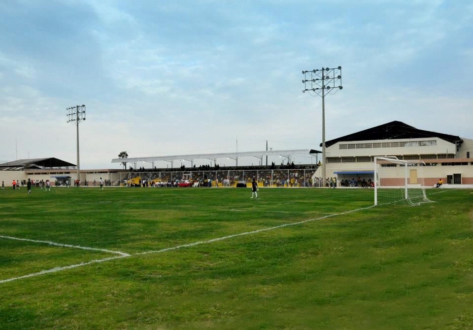 Estadio Washington Villalta en el 2016